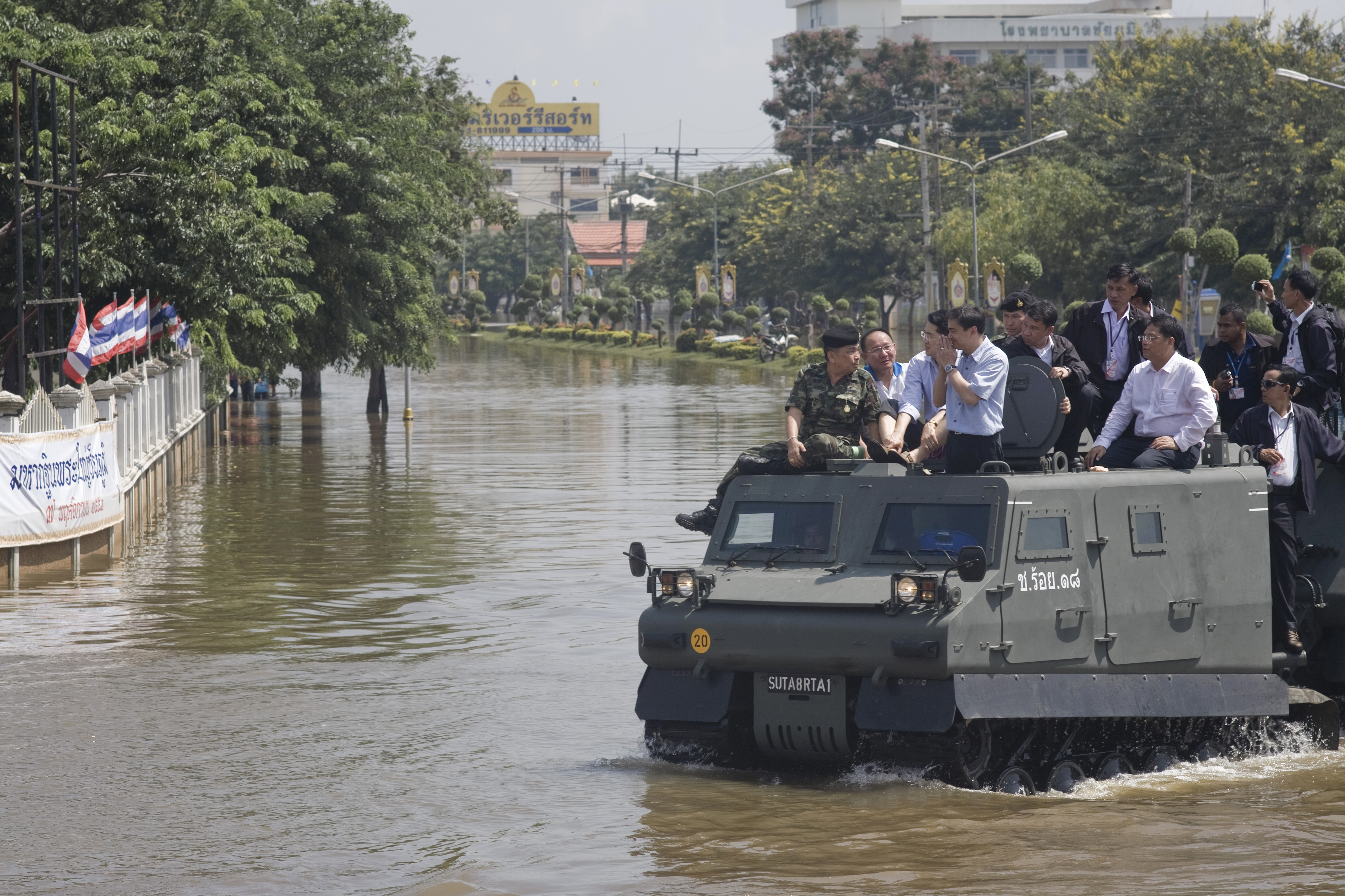 นายกรัฐมนตรีตรวจเยี่ยมน้ำท่วมในอ.เมือง จังหวัดชัยภูมิ วันเสาร์ ที่ 23 ตุลาคม พ.ศ.2553 (Photographer attached to the Prime Minister of the Kingdom of Thailand : Peerapat Wimolrungkarat / พีรพัฒน์ วิมลรังครัตน์) @is50mm